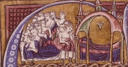 Épidémie à Antioche (1098)